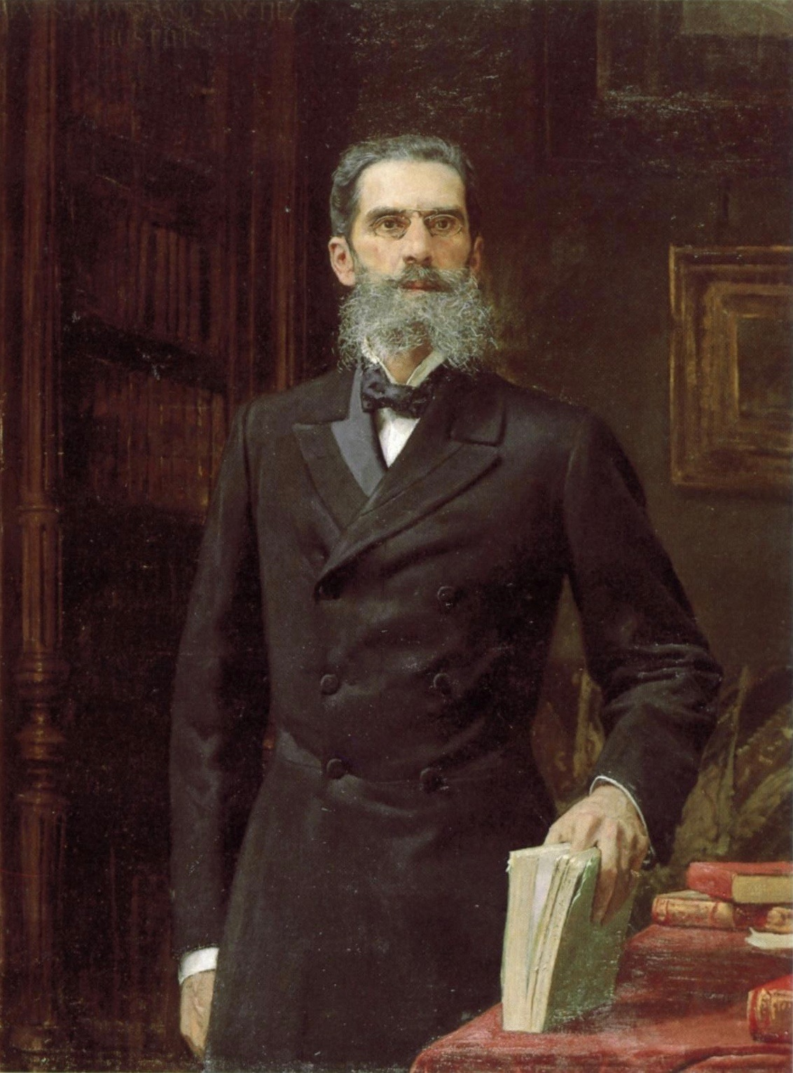 Cayetano Sanchéz Bustillo